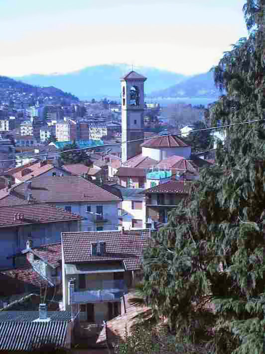 Luino, tetti e campanile